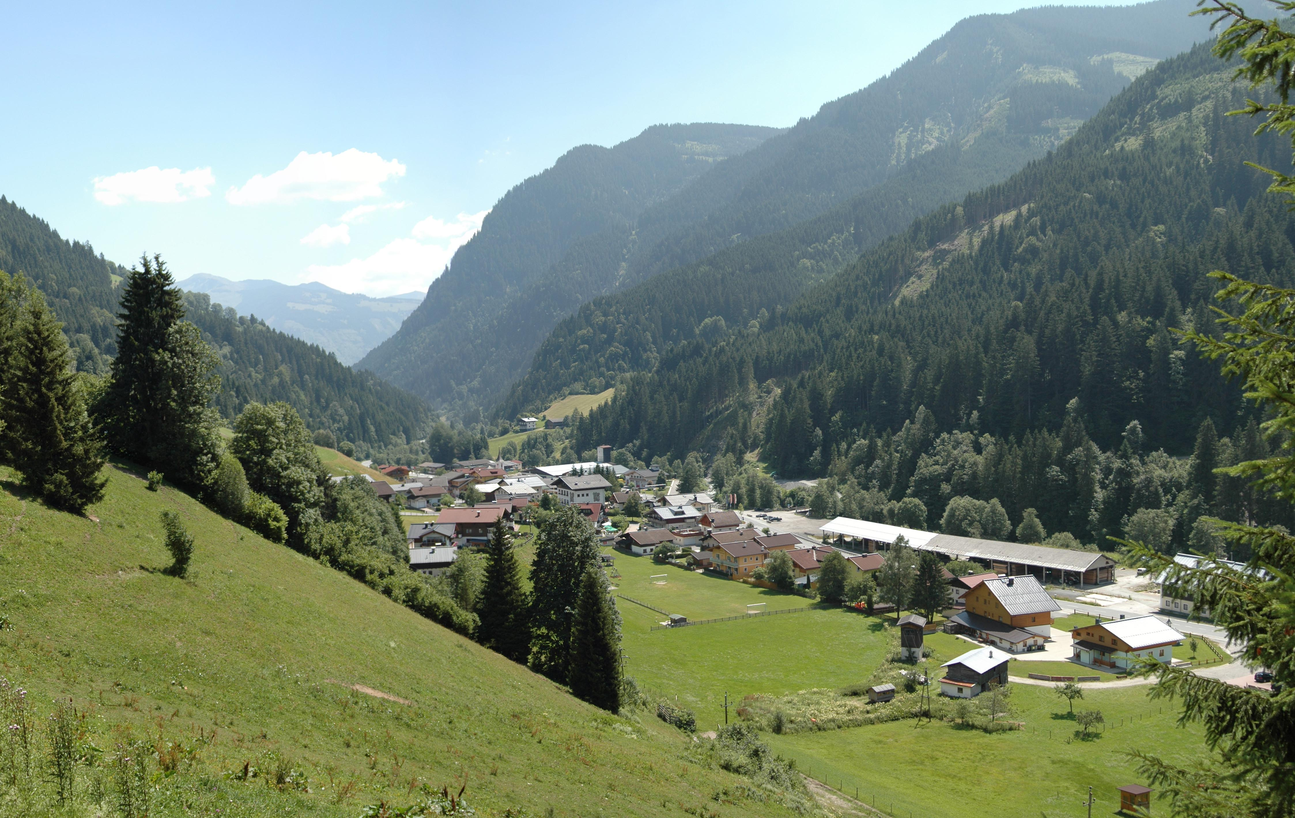 Viehhofen talauswärts